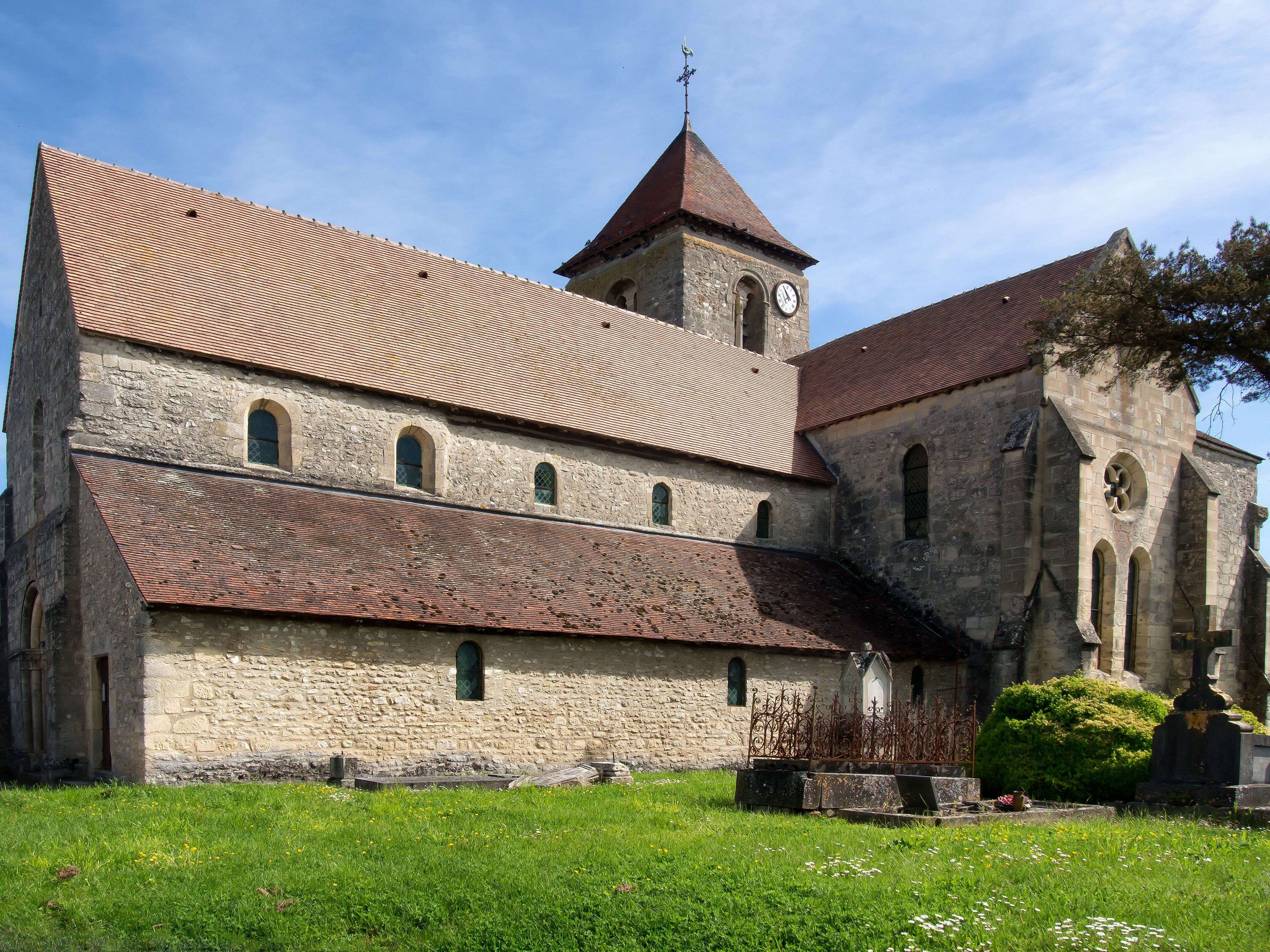 Crugny, Église Saint-Pierre